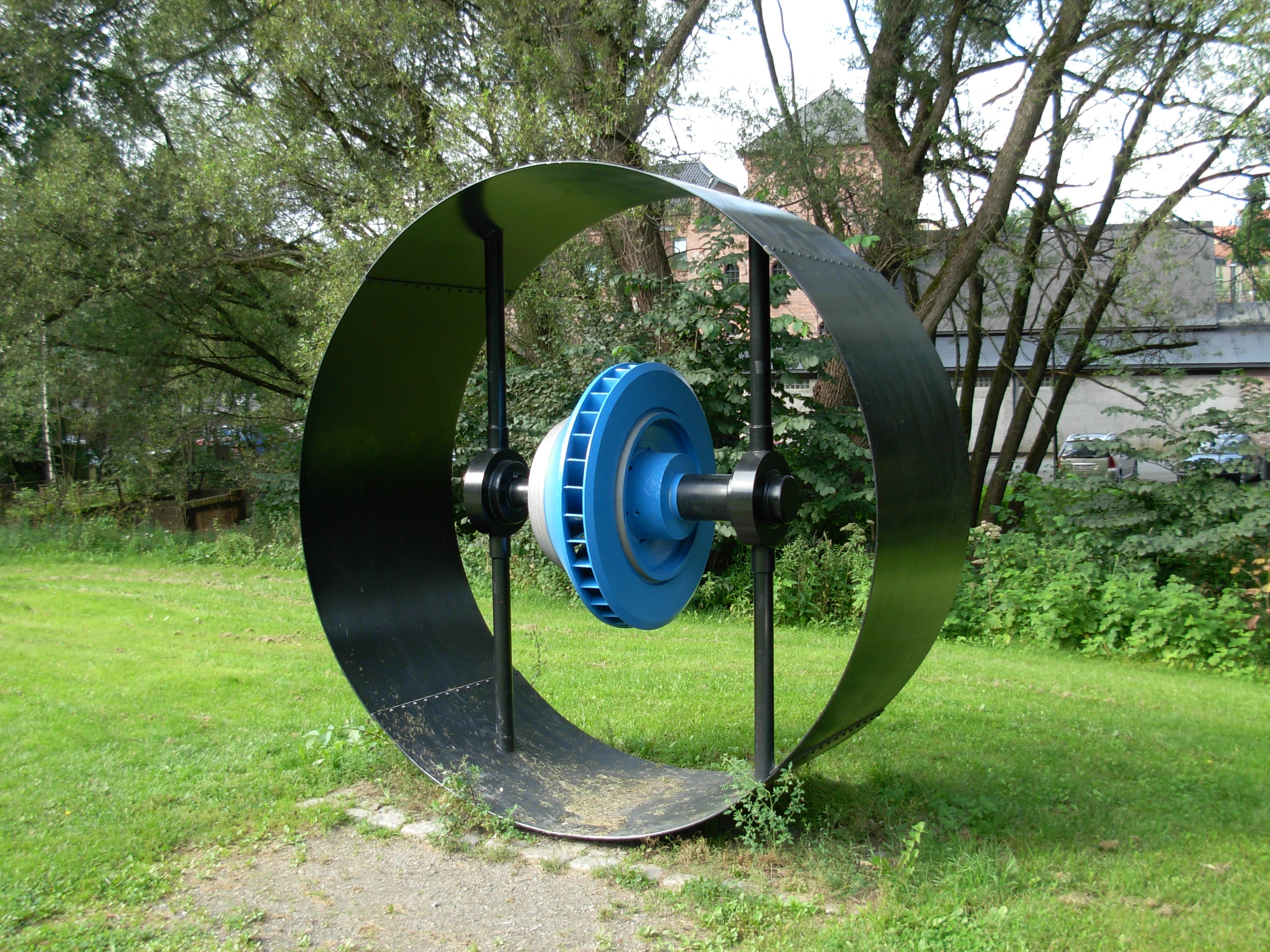 Svartdalsparken in Oslo, Det blå løpehjulet